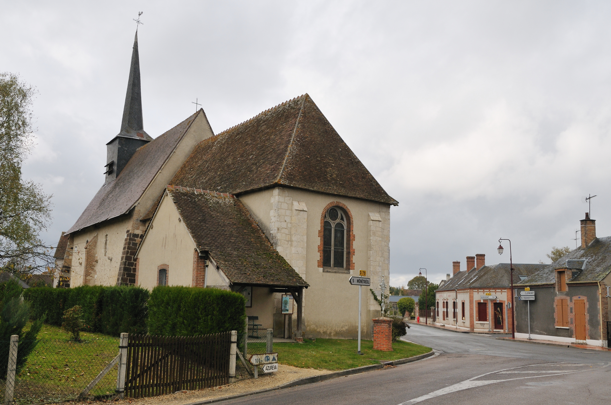 Église Sainte-Montaine, Sainte-Montaine, Cher, France